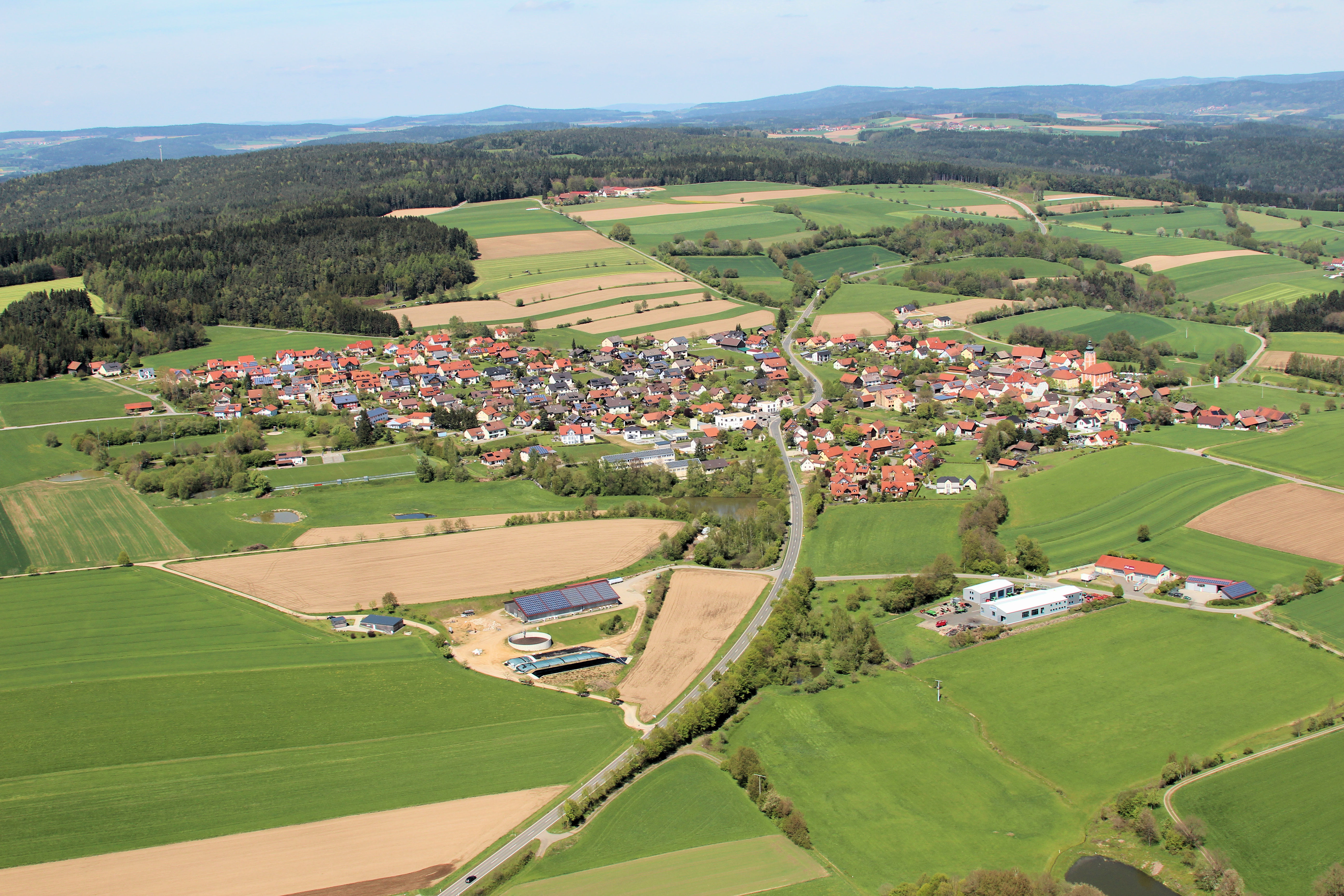 Dieterskirchen, Landkreis Schwandorf, Oberpfalz, Bayern